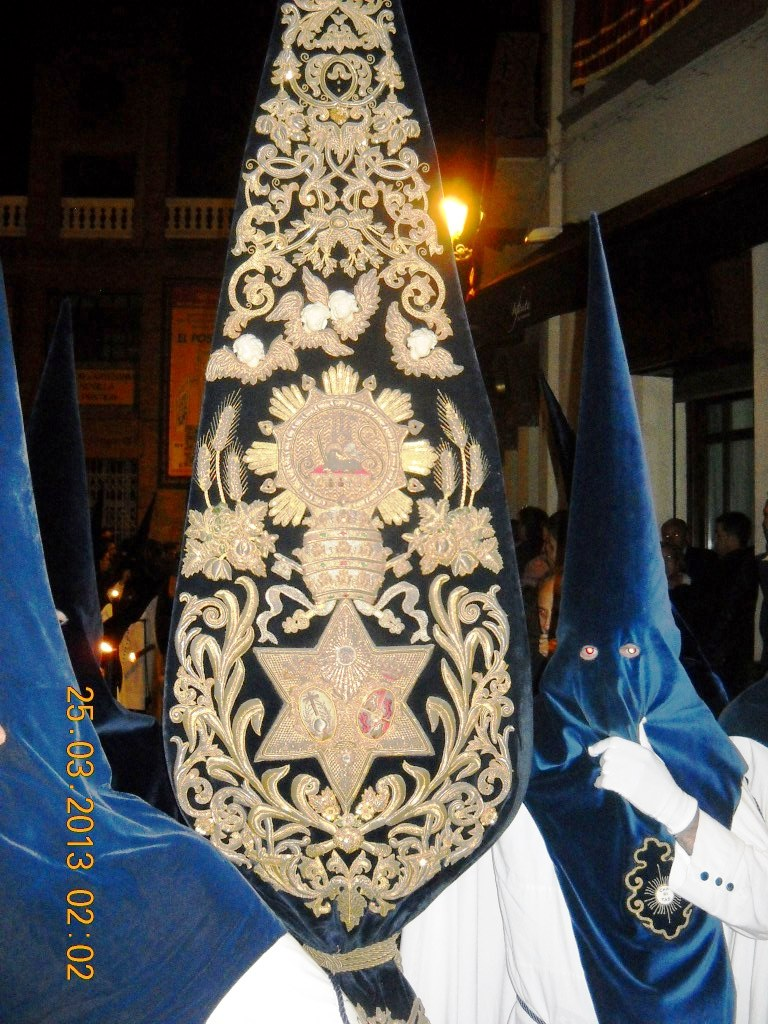 Escudo que aparece en el bacalao de la Hermandad